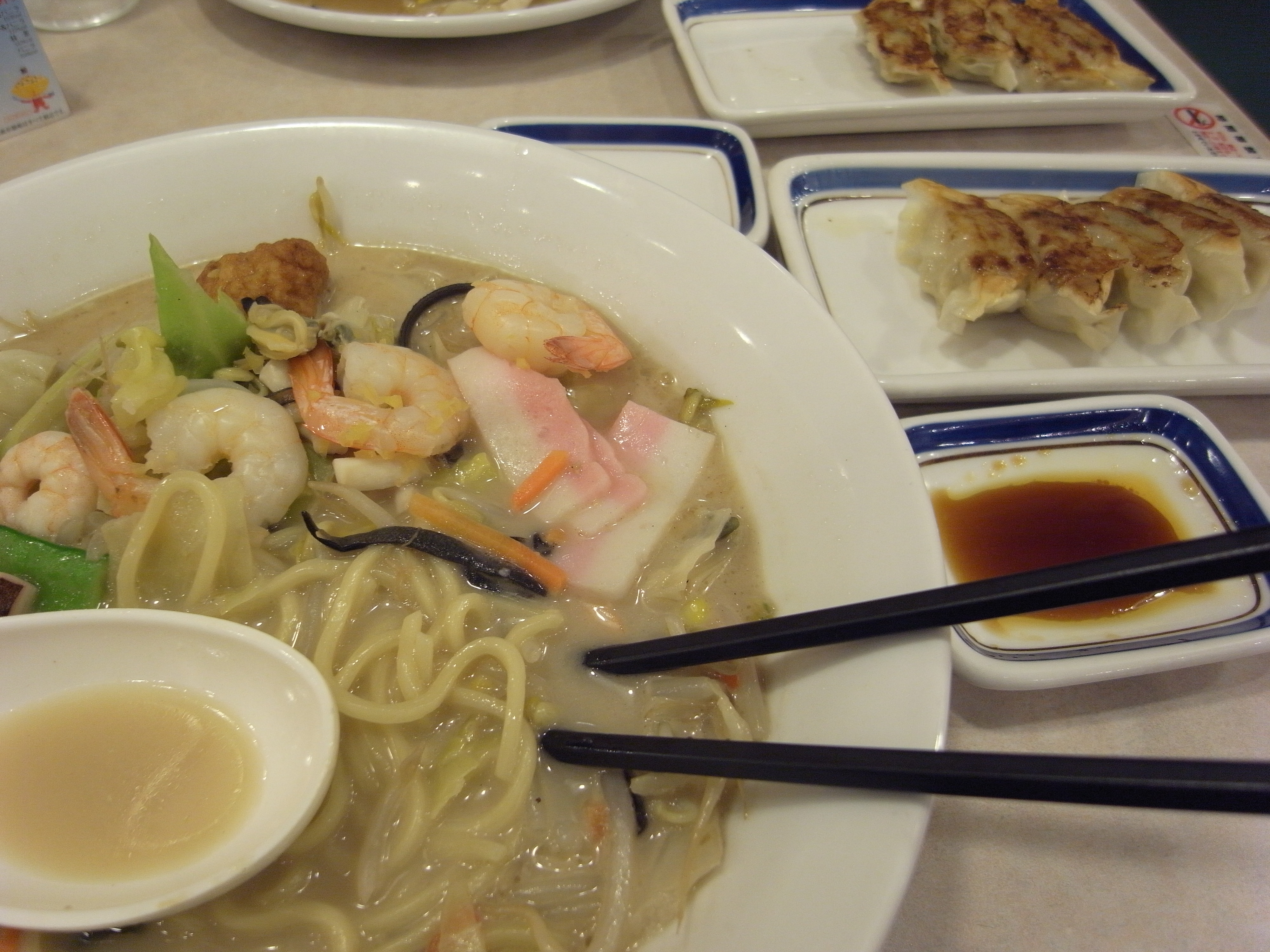 Food at Ringer Hut